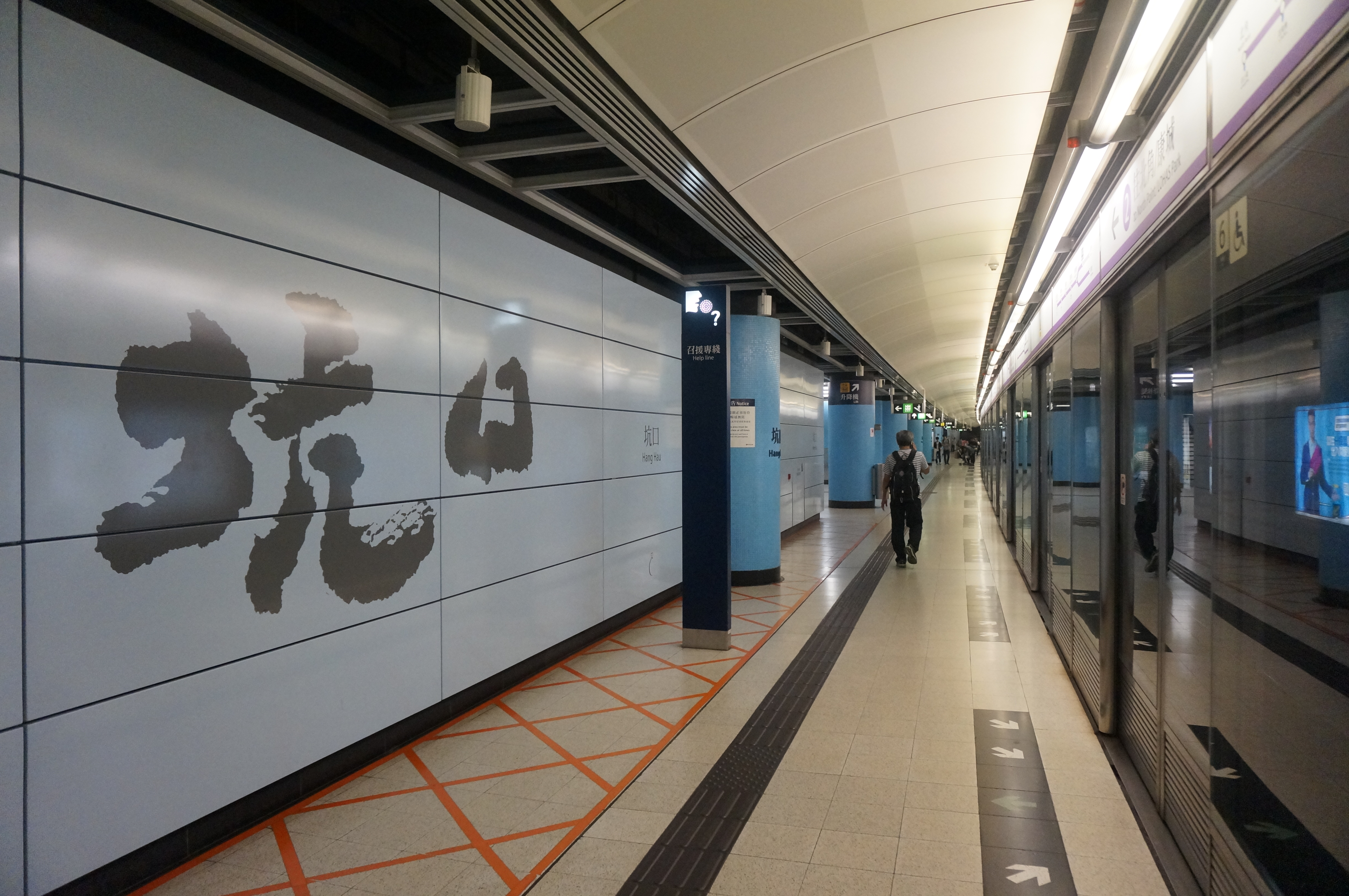 港鐵坑口站月台